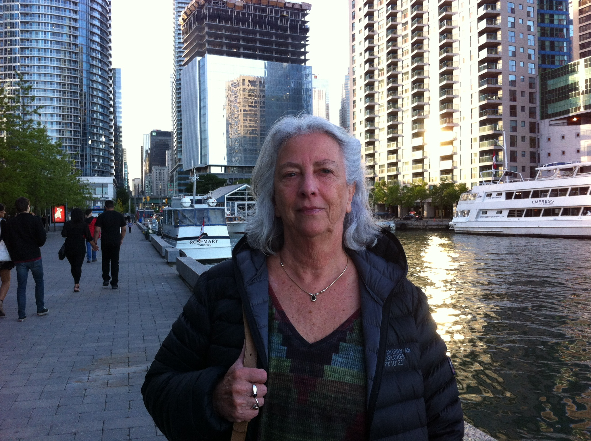 Foto de la filósofa Eli Bartra tomada en Toronto